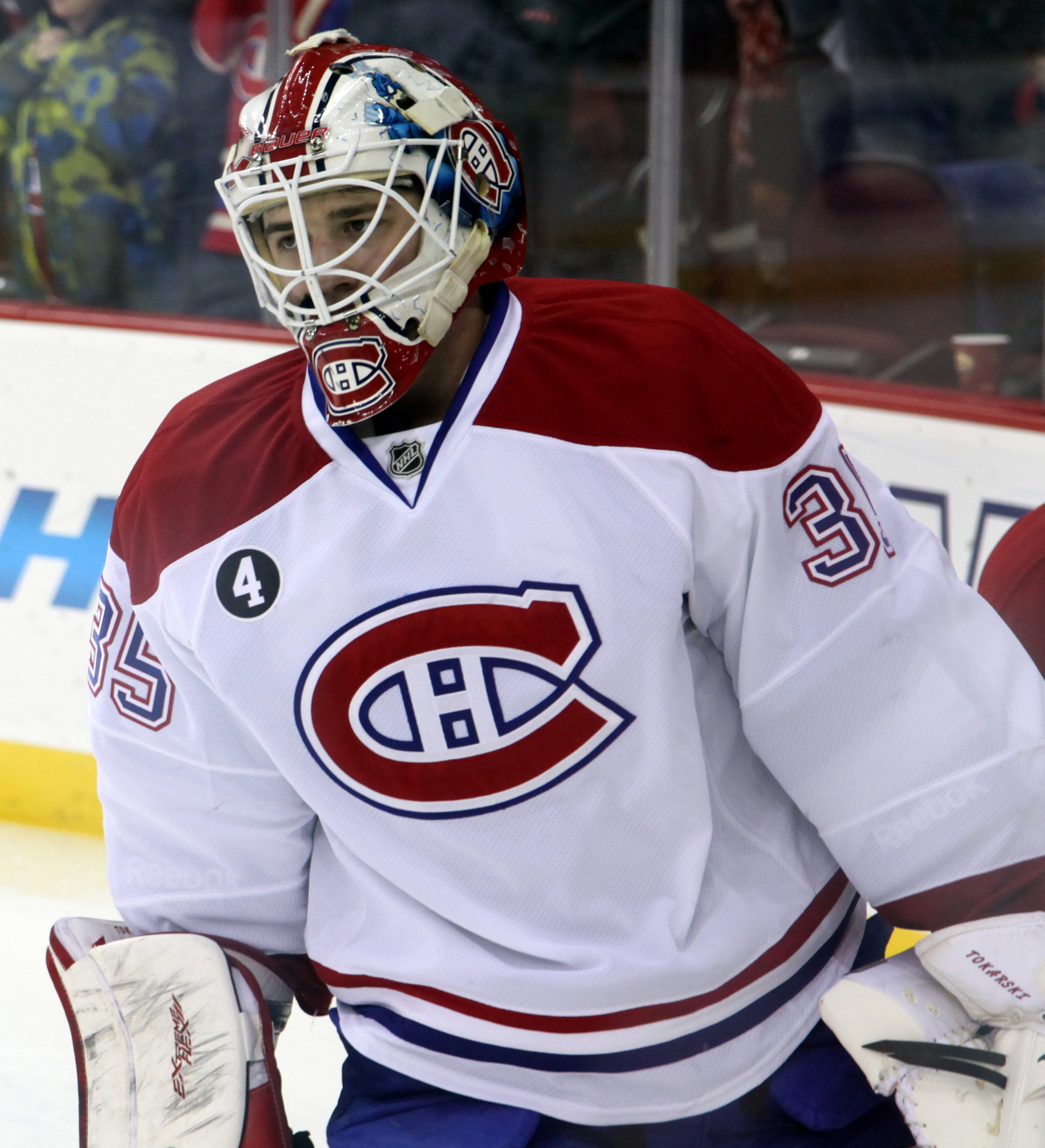 Dustin Tokarski in January 2015.